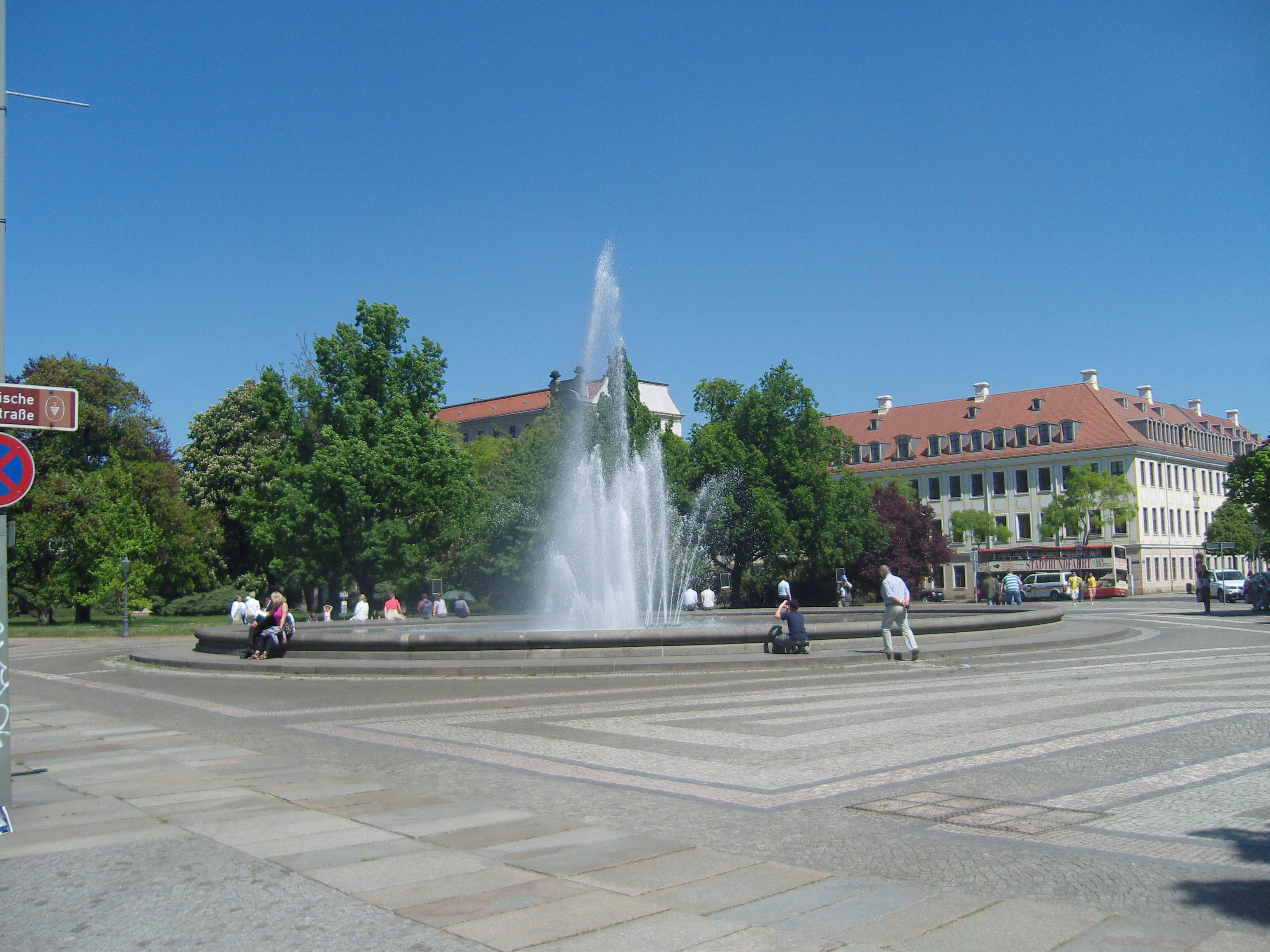 Brunnen am Palaisplatz in Dresden